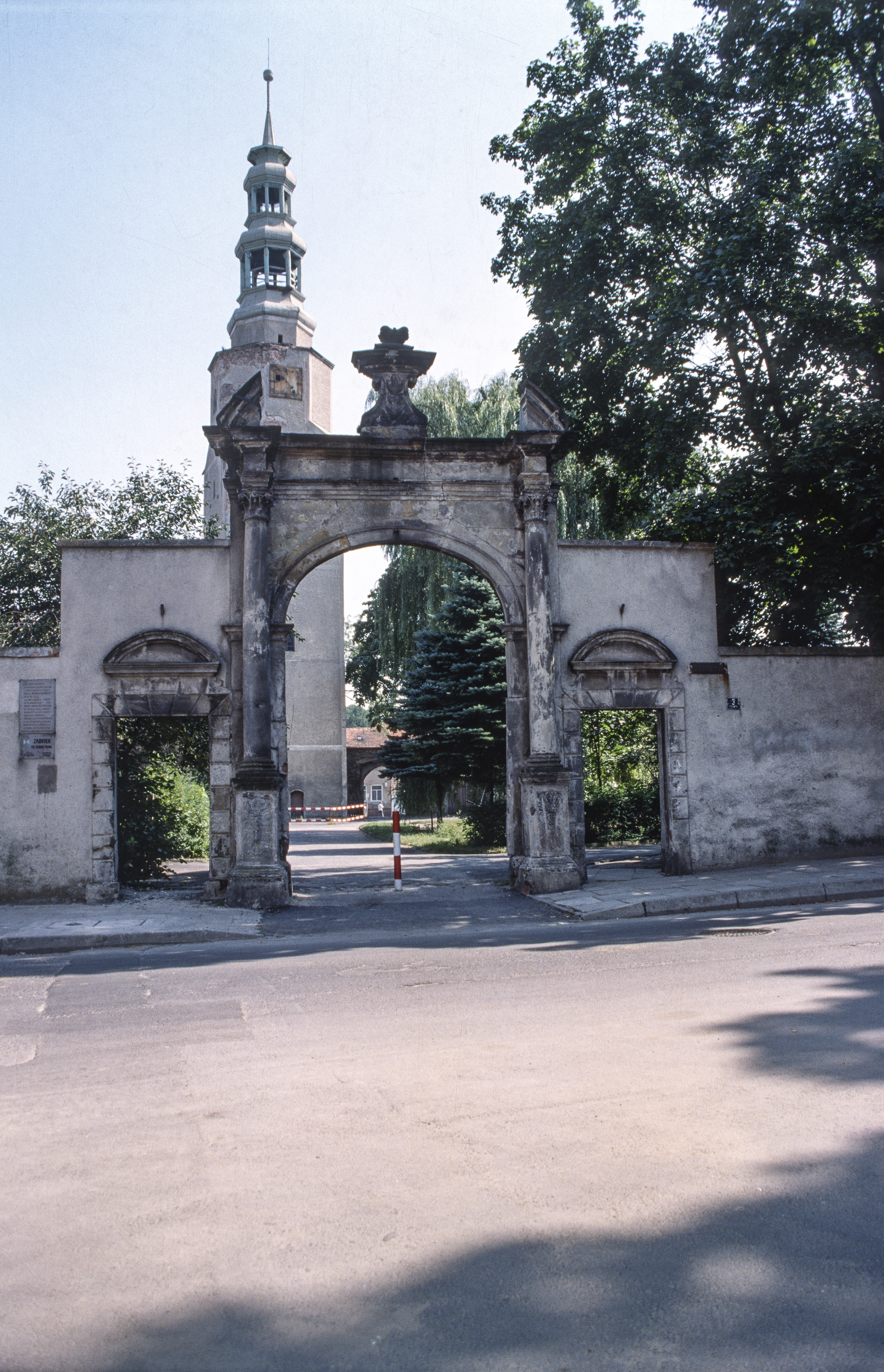 Bierutów, brama barokowa